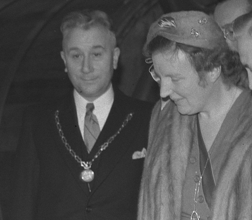 Collectie / Archief : Fotocollectie Anefo Reportage / Serie : [ onbekend ] Beschrijving : Koninklijk bezoek Friesland Datum : 25 september 1950 Locatie : Friesland Trefwoorden : bezoeken, koninklijk huis Persoonsnaam : Juliana koningin Fotograaf : Noske, J.D. / Anefo Auteursrechthebbende : Nationaal Archief Materiaalsoort : Glasnegatief Nummer archiefinventaris : bekijk toegang 2.24.01.09 Bestanddeelnummer : 904-2094